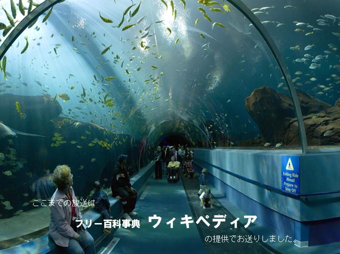 提供クレジット表示例（比率4:3、背景あり、縮小版）